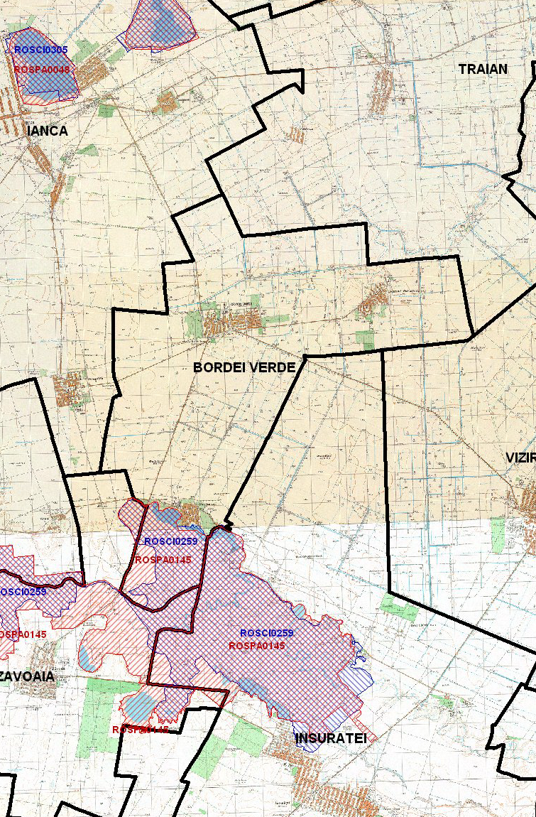 Zona din situl "Natura 2000" - ROSCI0259 - aflată pe teritoriul comunei Bordei Verde